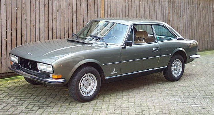 Peugeot 504 Coupé 1978